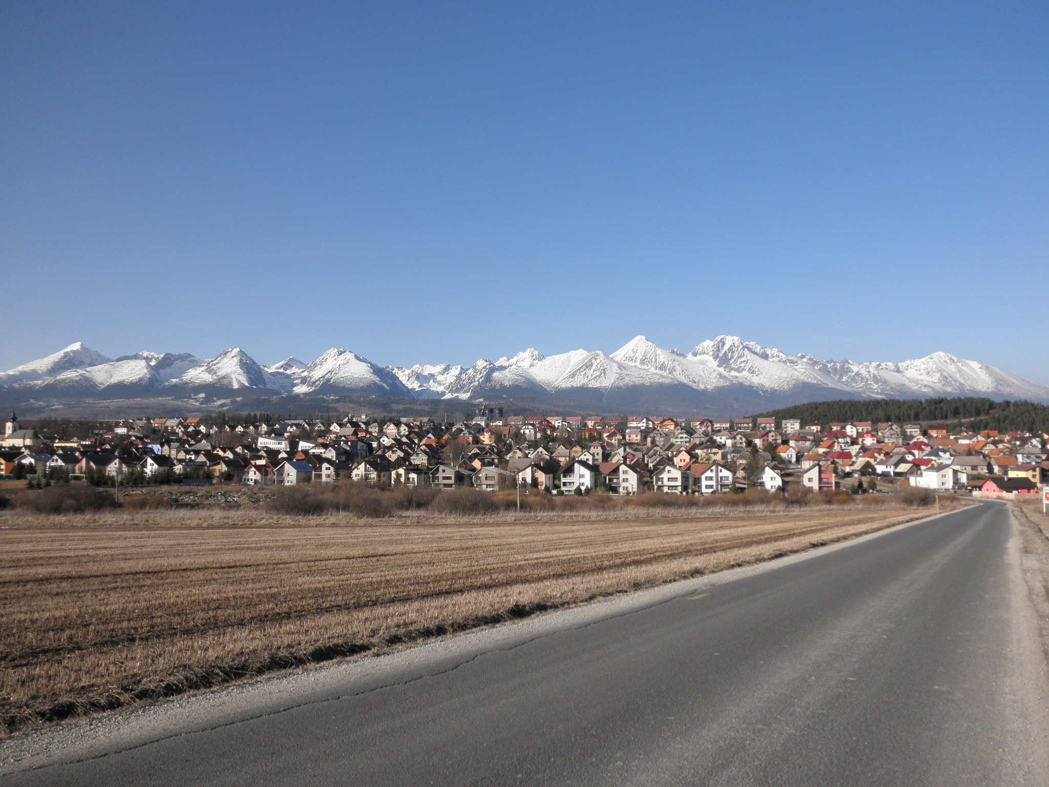 Obec